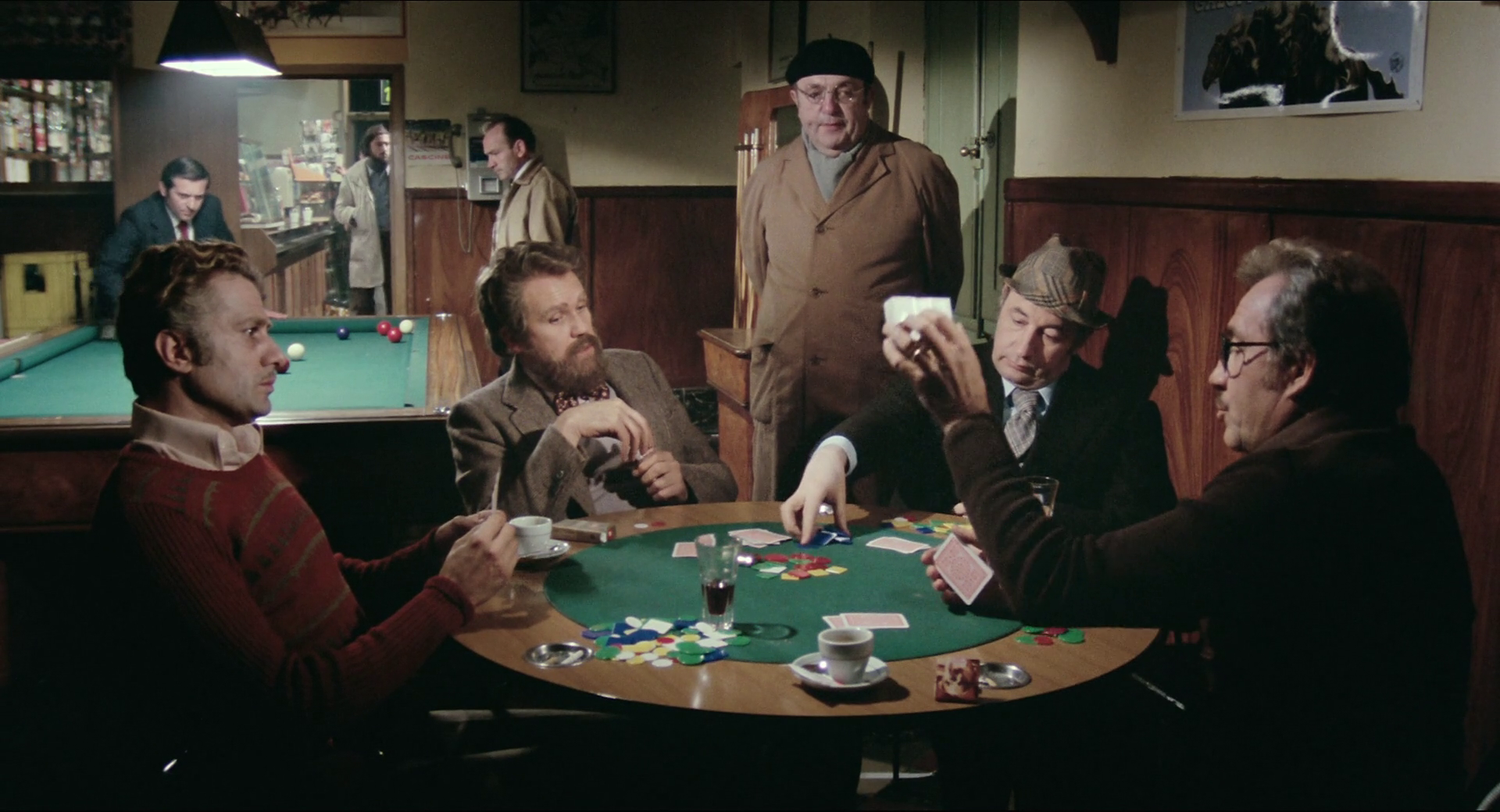 scena dal film Amici miei